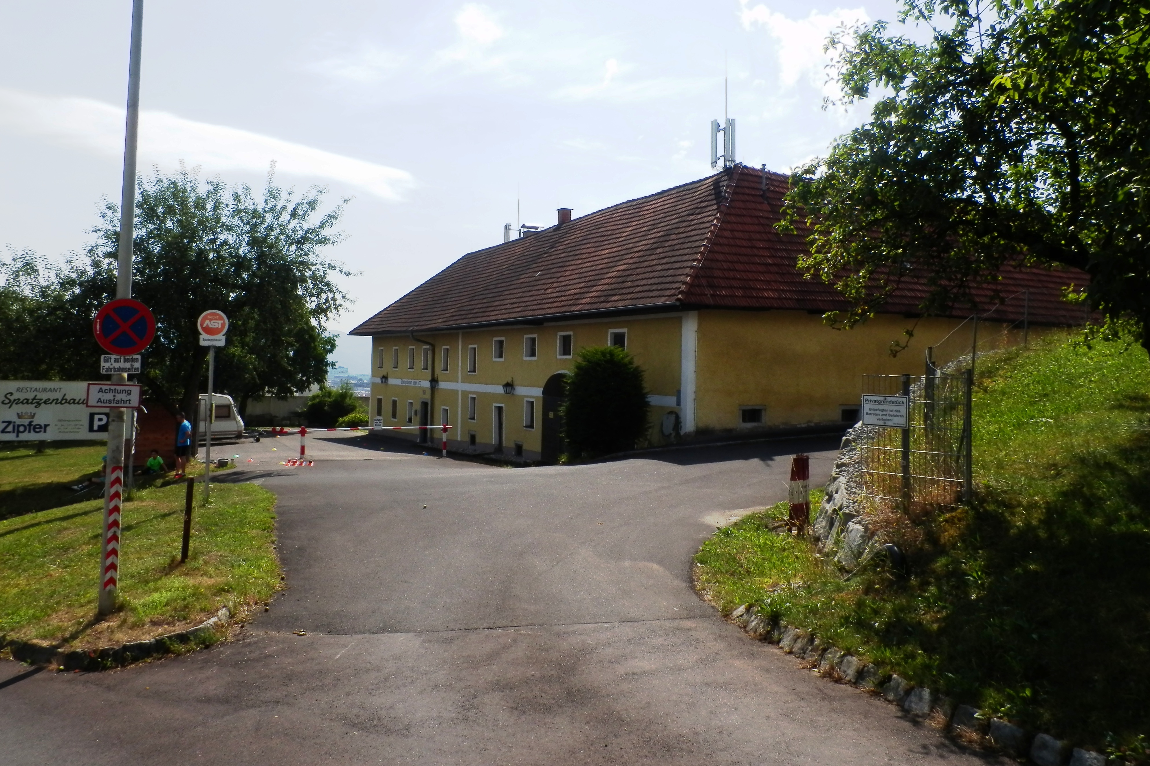 Gasthaus Spatzenbauer, Linz, Berggasse